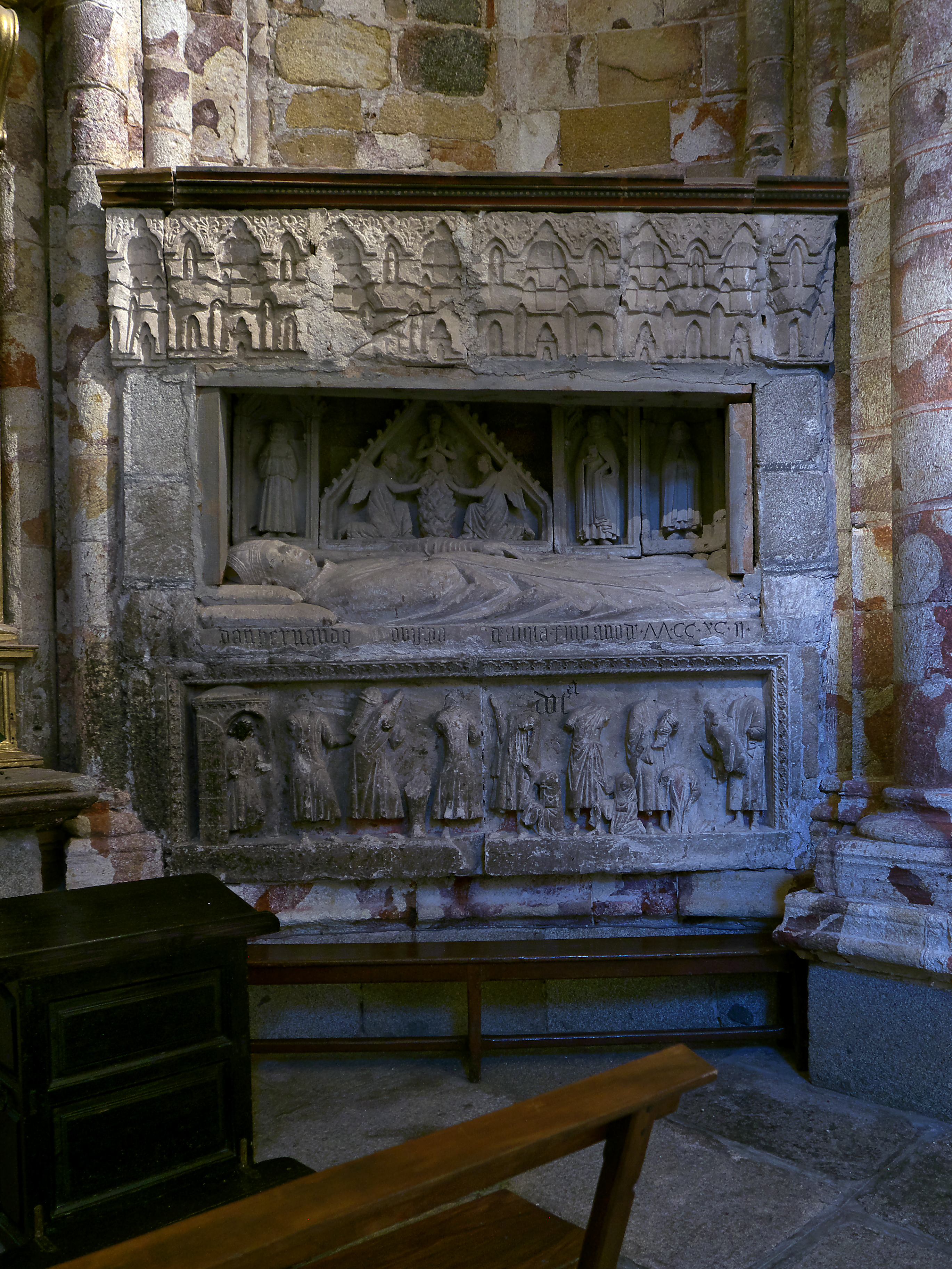 Capilla de San Nicolás, Catedral de Ávila. Sepulcro del obispo don Hernando (Fernando Rodríguez) (†1292). Existe similitudes con el sepulcro del obispo Martín Rodríguez (†1242), Catedral de León.